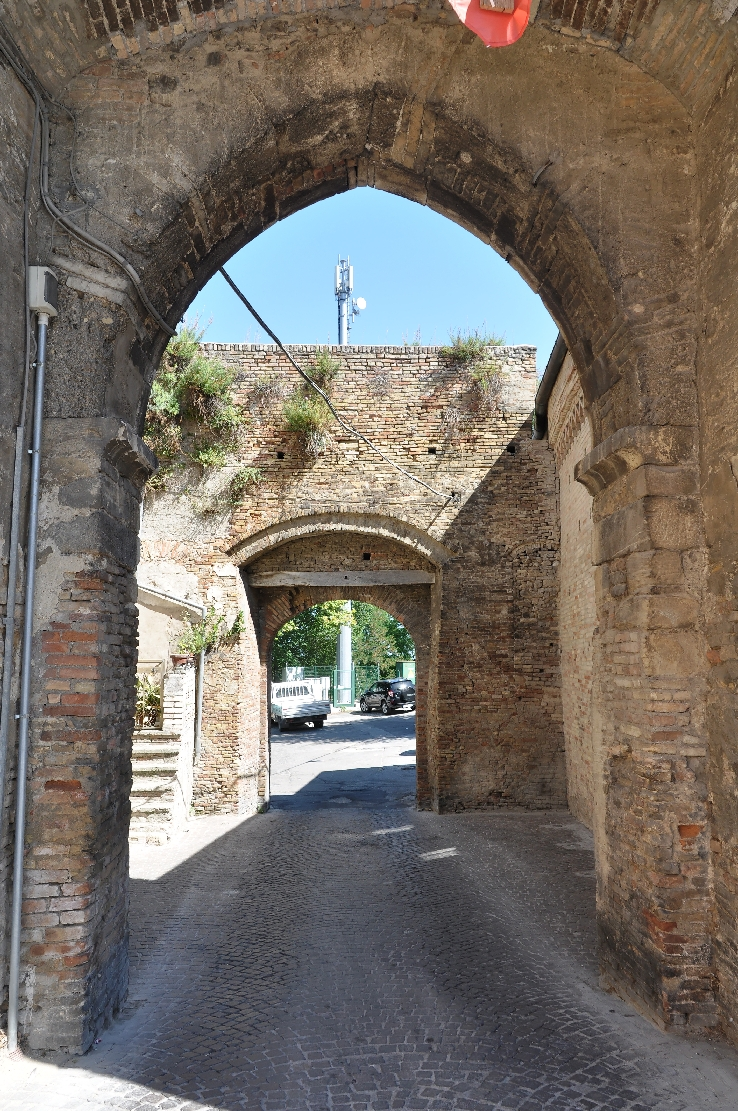 Penne (comune, Italy) 2012